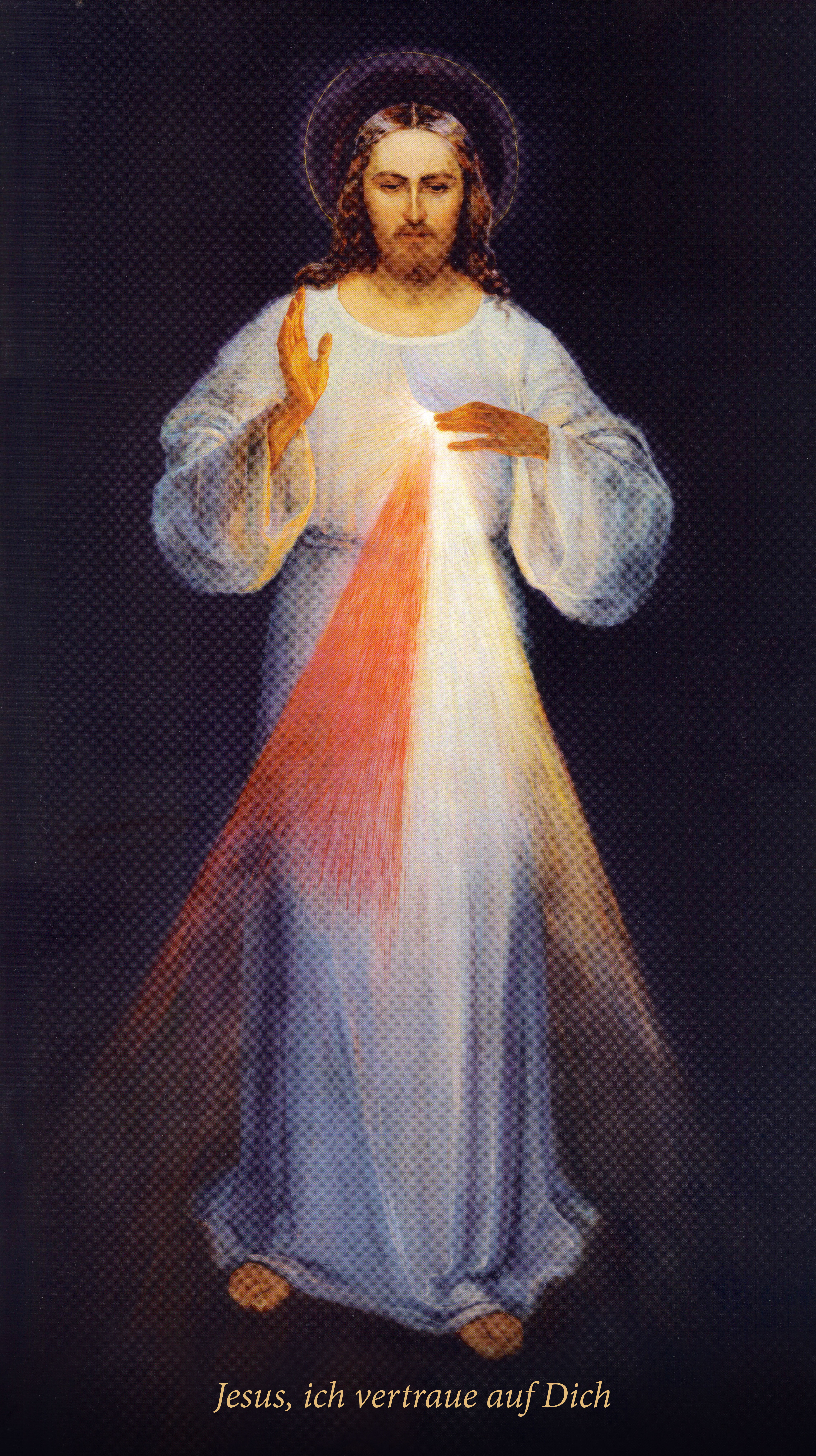 Das Bild von Eugeniusz Kazimirowski in Vilnius